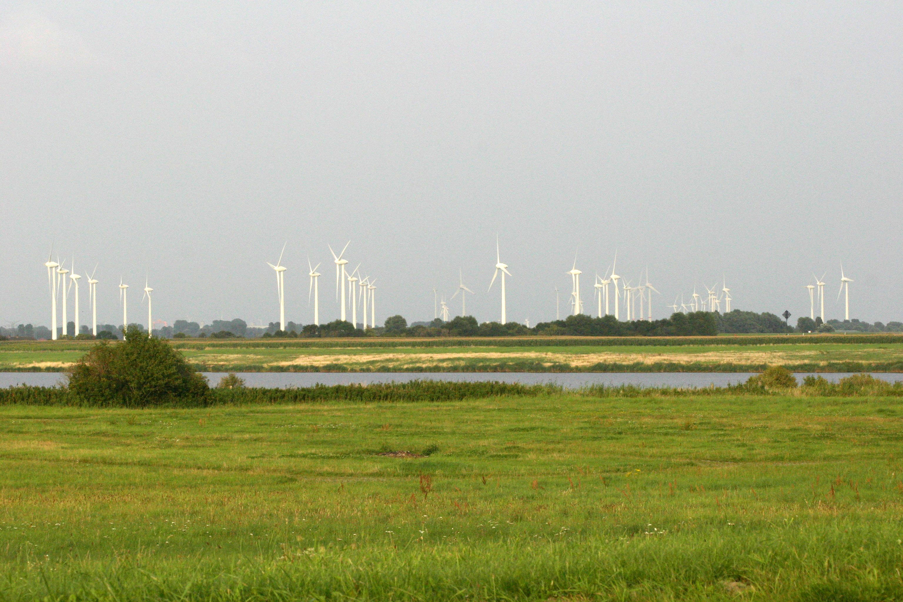 Windpark Wybelsumer Polder in Emden, laut Betreiber einer der größten (on-shore-)Windparks Europas.